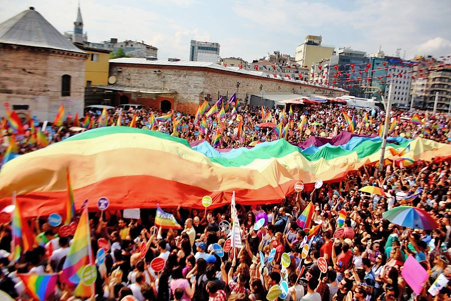 LGBT Onur Haftası, 21. LGBT Onur Yürüyüşü, 2013, Taksim, İstanbul.